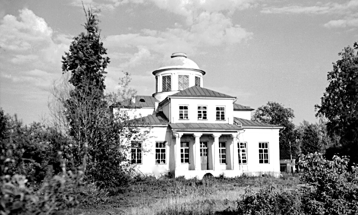 Главный дом усадьбы Повалишиных 1956г